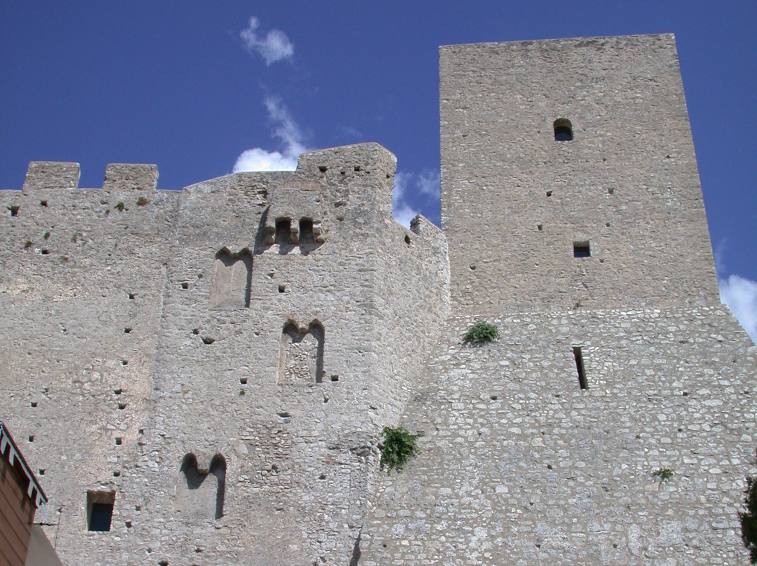 Itri, provincia di Latina, regione Lazio, Italia. Città alta, il Castello, particolare